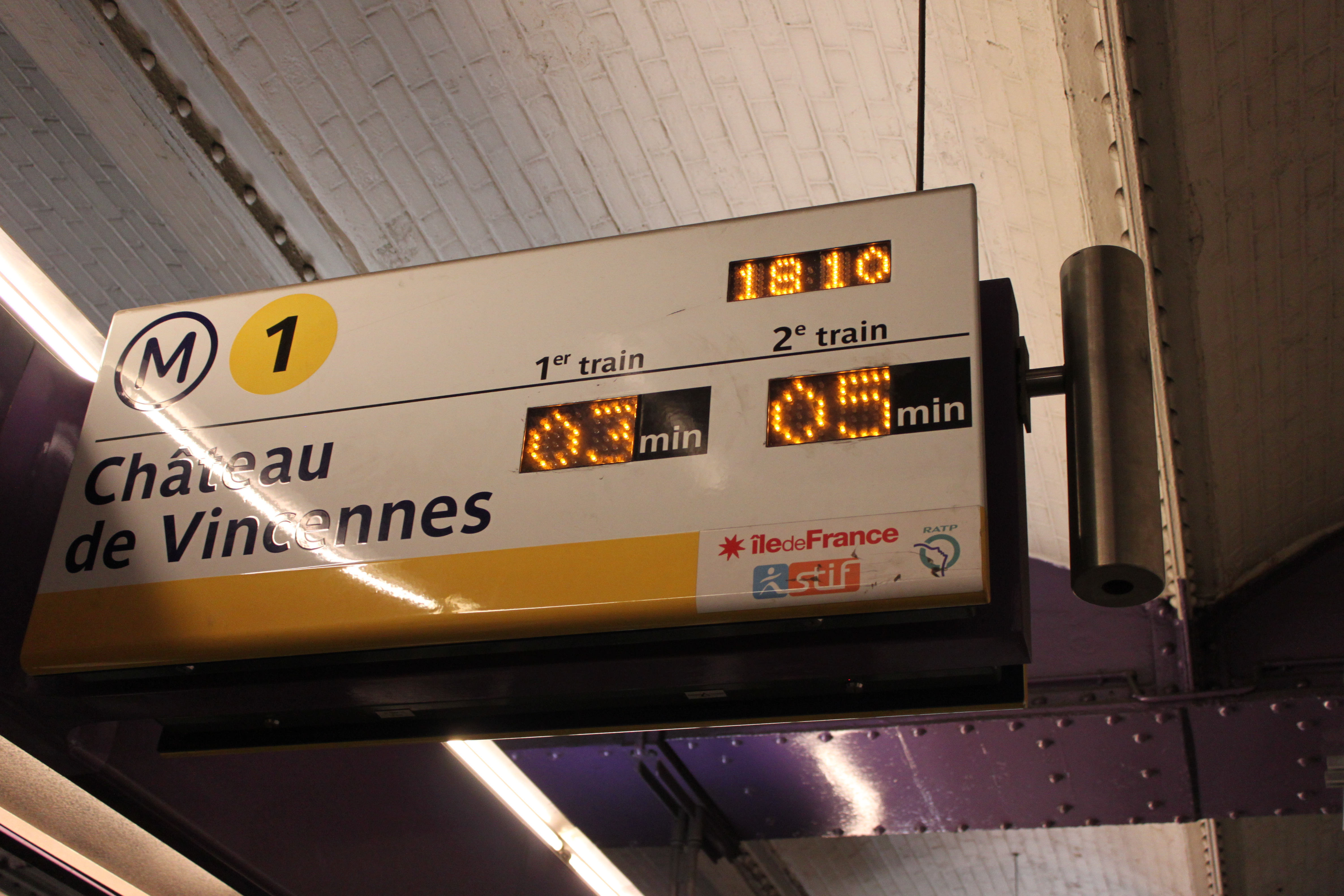 Panneau SIEL indiquant les temps d'attente avant les deux prochains trains en direction de Château de Vincennes à la station Palais Royal Musée du Louvre sur la ligne 1 du métro de Paris.